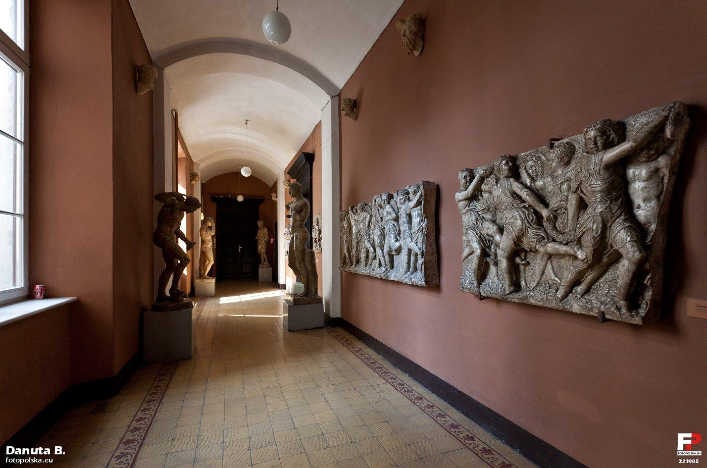 Korytarz na I lub II piętrze. Tu posadzka jeszcze oryginalna.